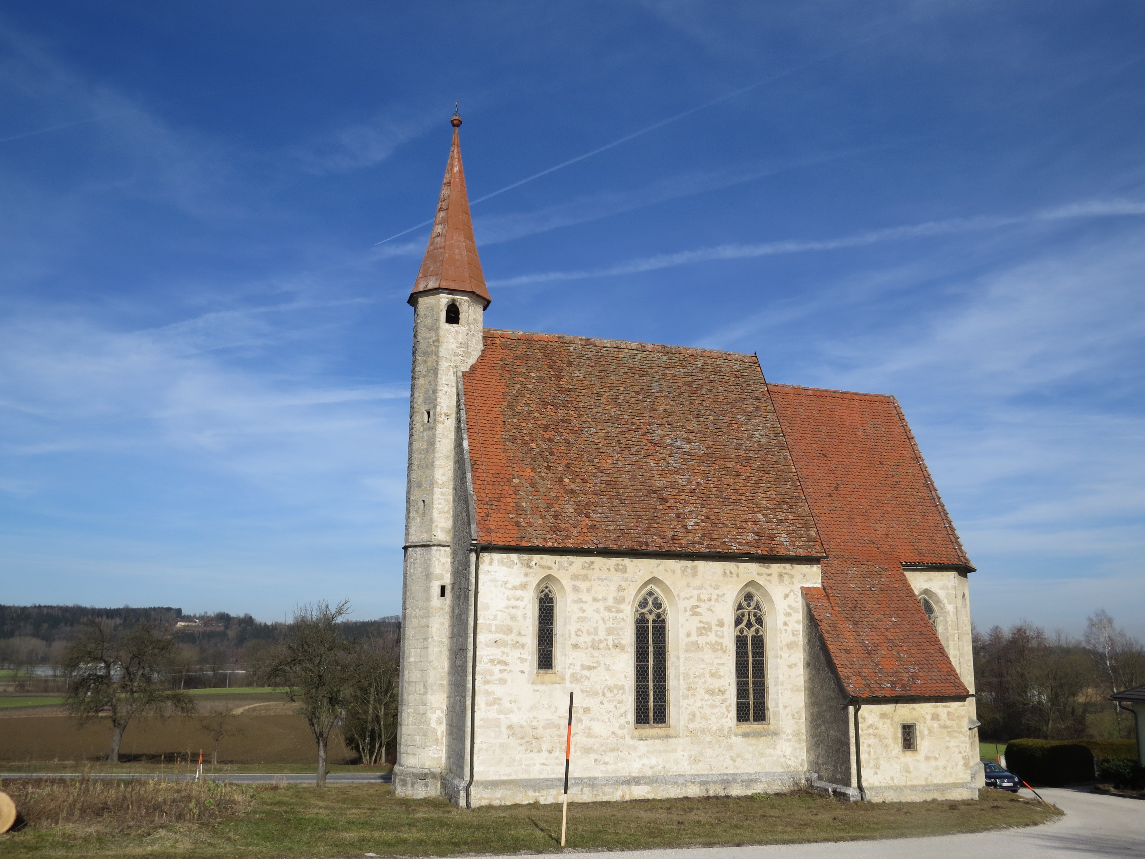 Kath. Filialkirche hll. Peter und Paul